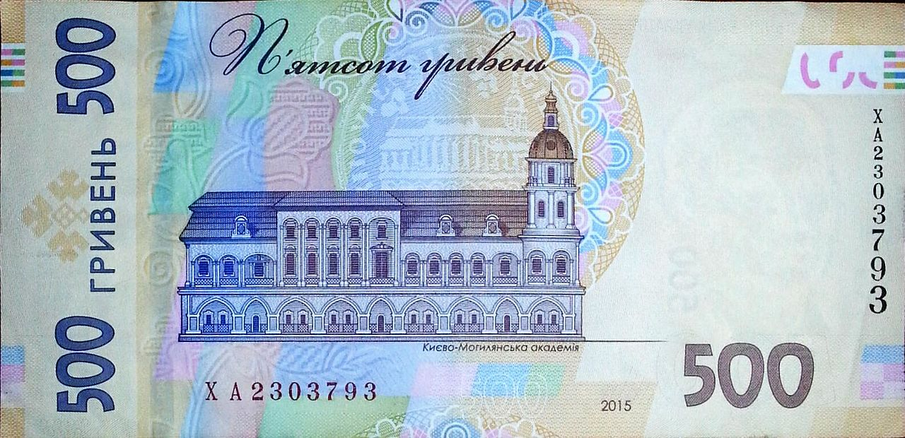 500 гривен 2015 года выпуска